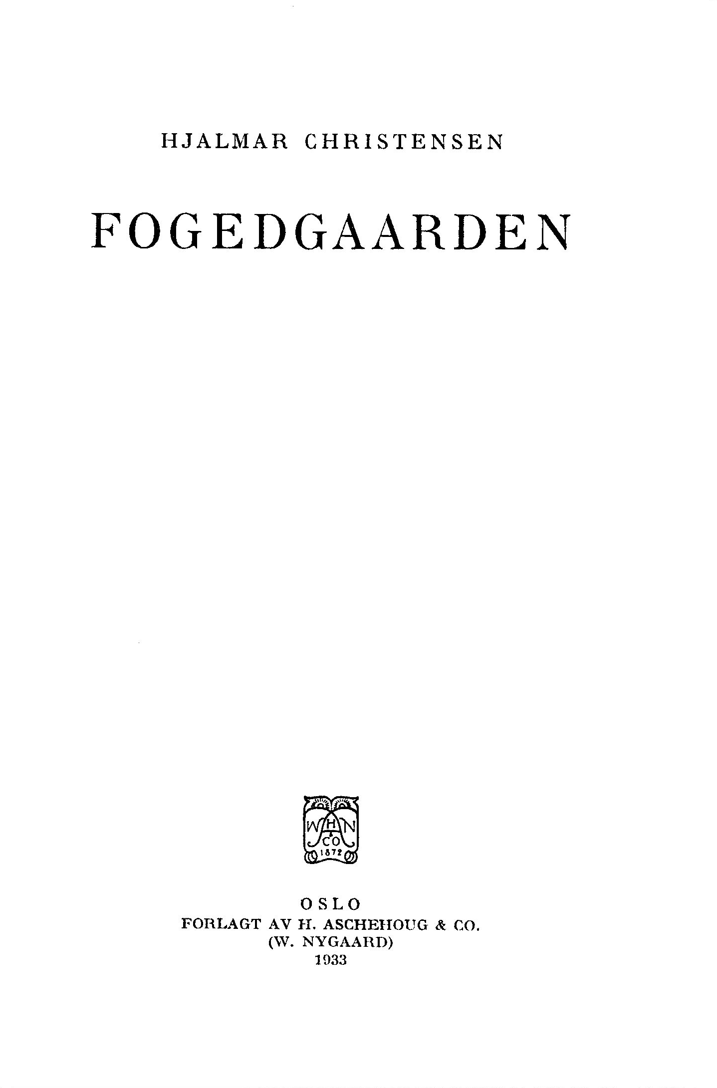 Tittelbladet til Hjalmar Christensens Fogedgaarden i Aschehougs serie «Tidens norske diktere»